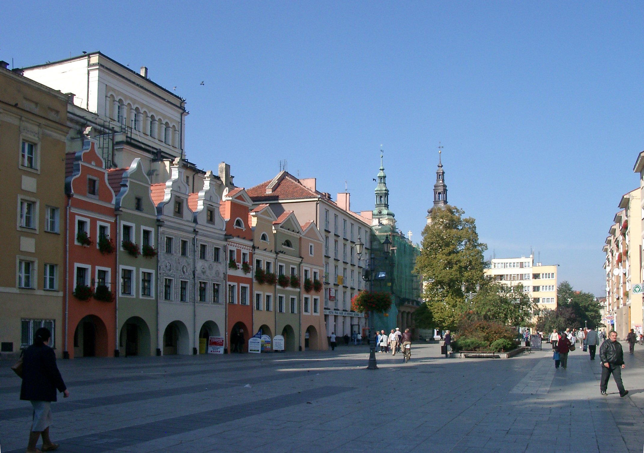 Rynek w Legnicy (Polska). Main square in Legnica, Poland.